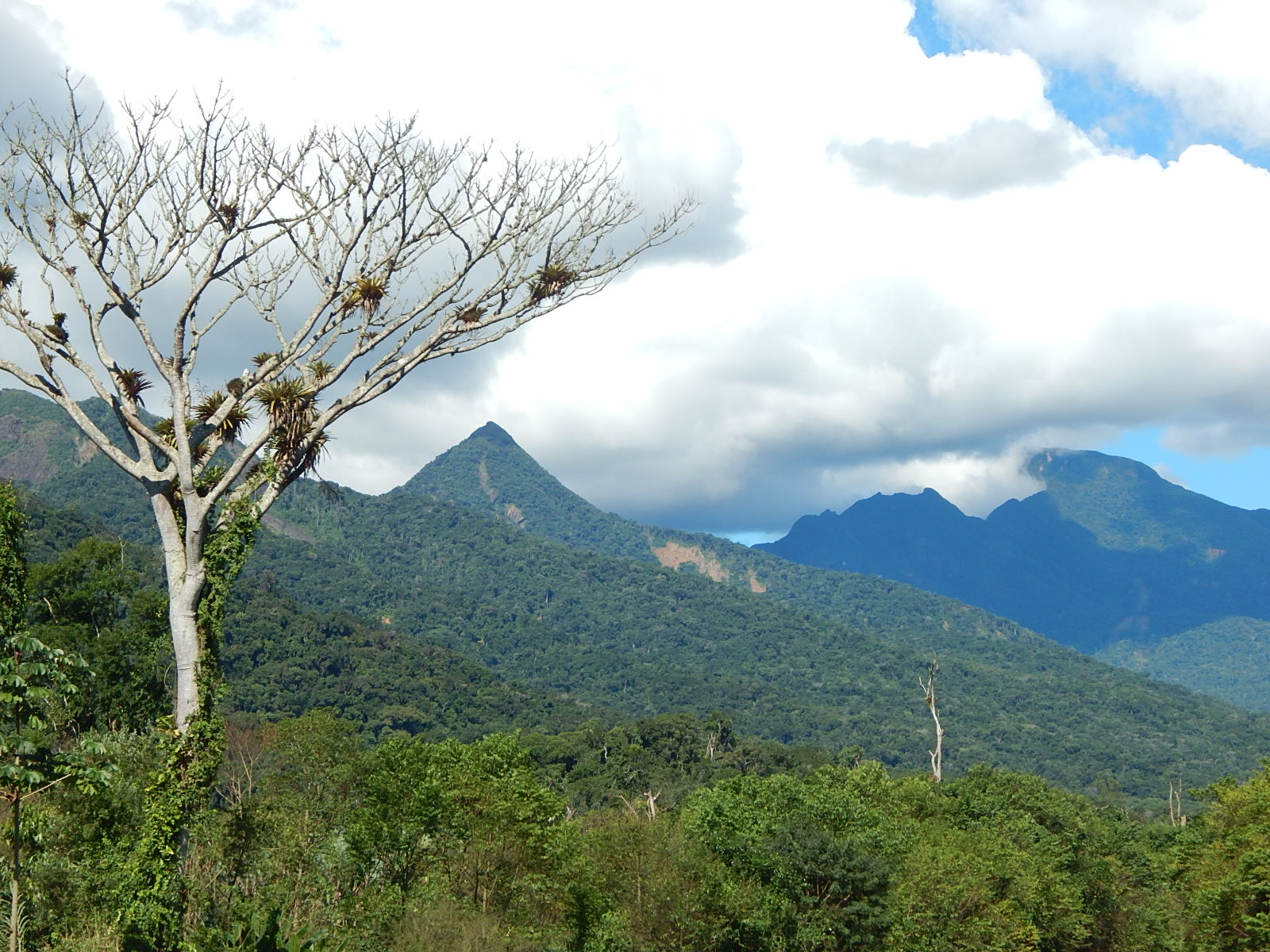 Serra do Mar Atlantic Forest